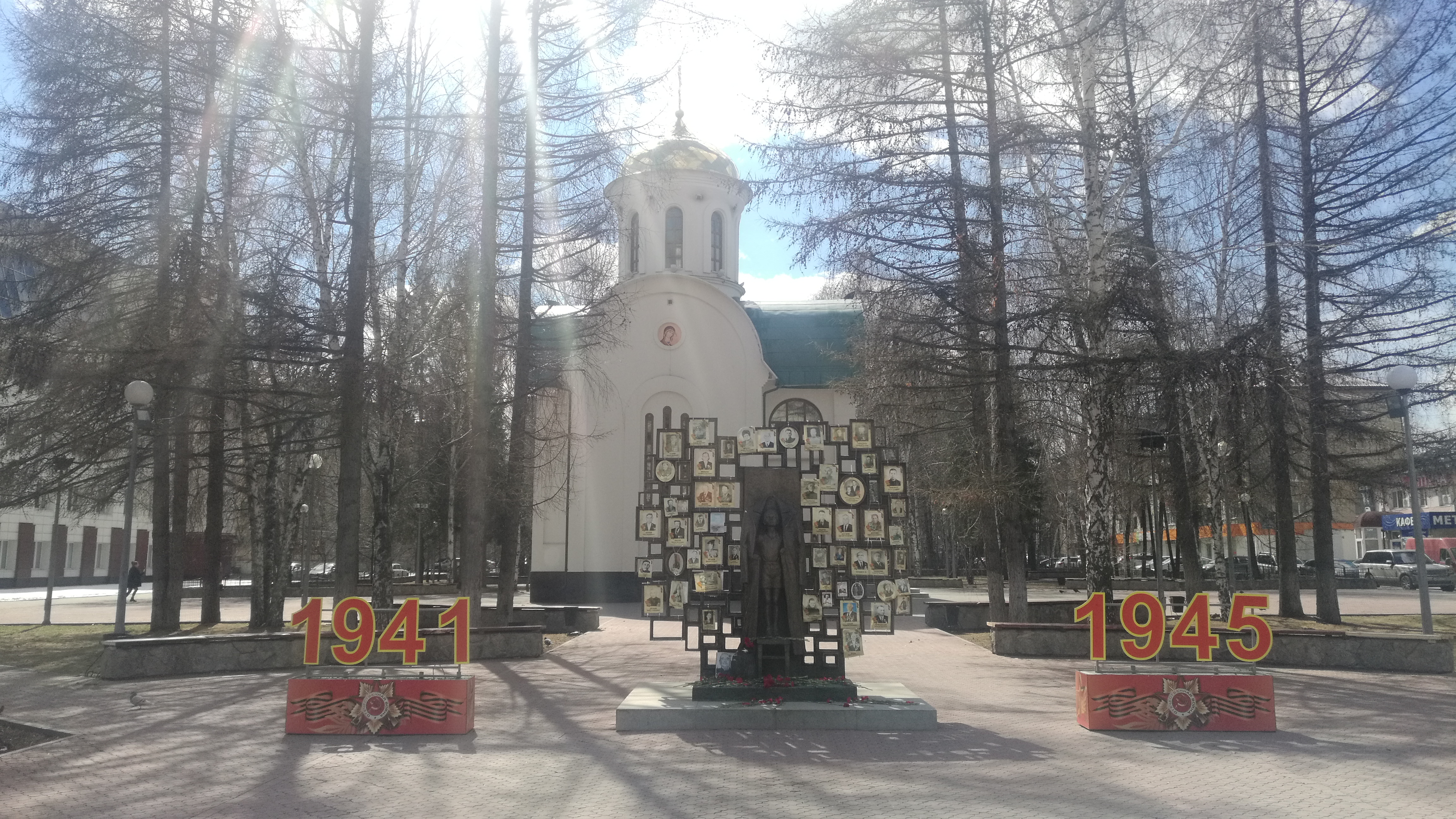 Placo de Gubkin. Tjumeno, Rusio.